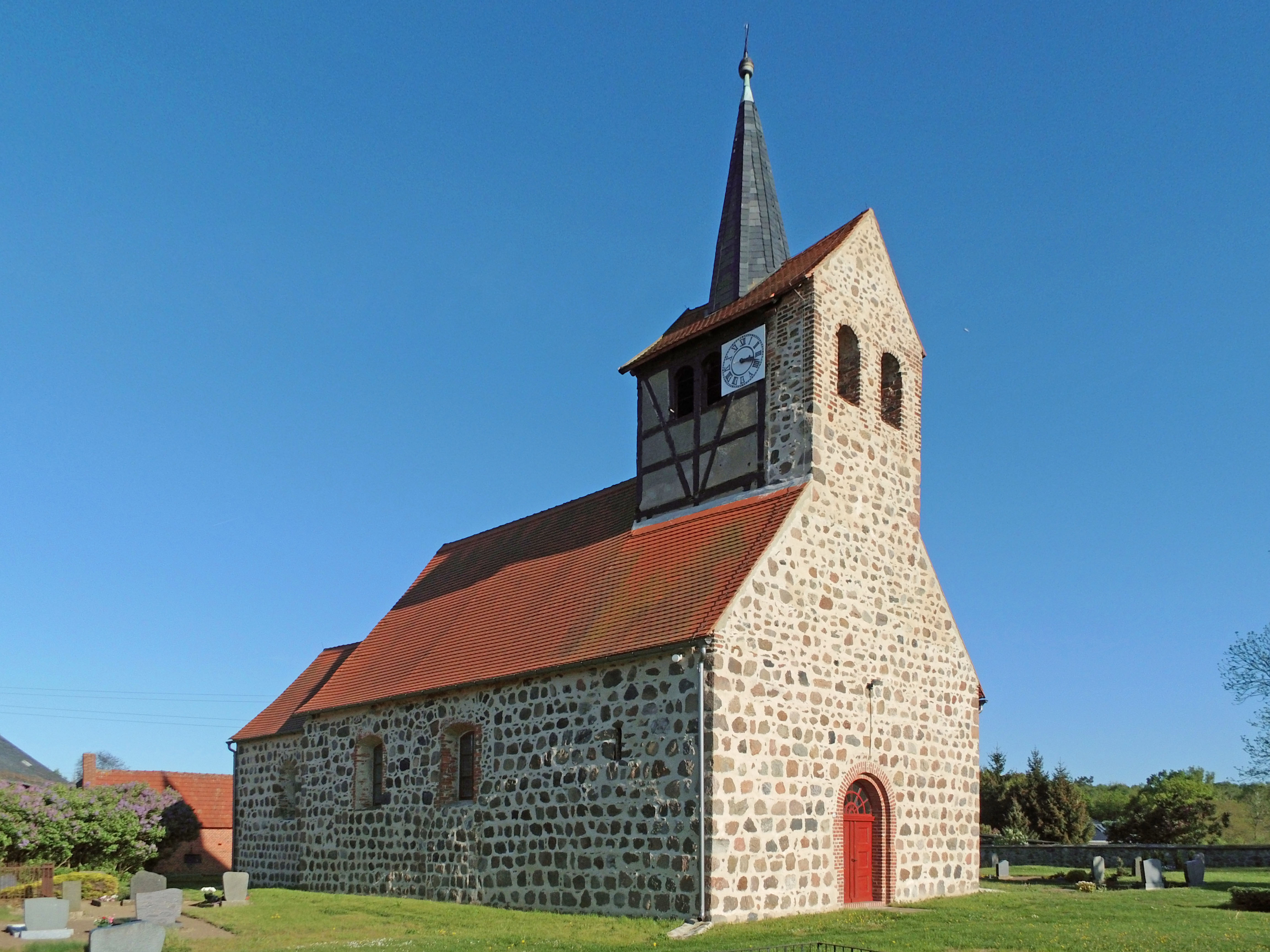 Evangelisch-lutherische Kirche in Schorstedt (Landkreis Stendal).